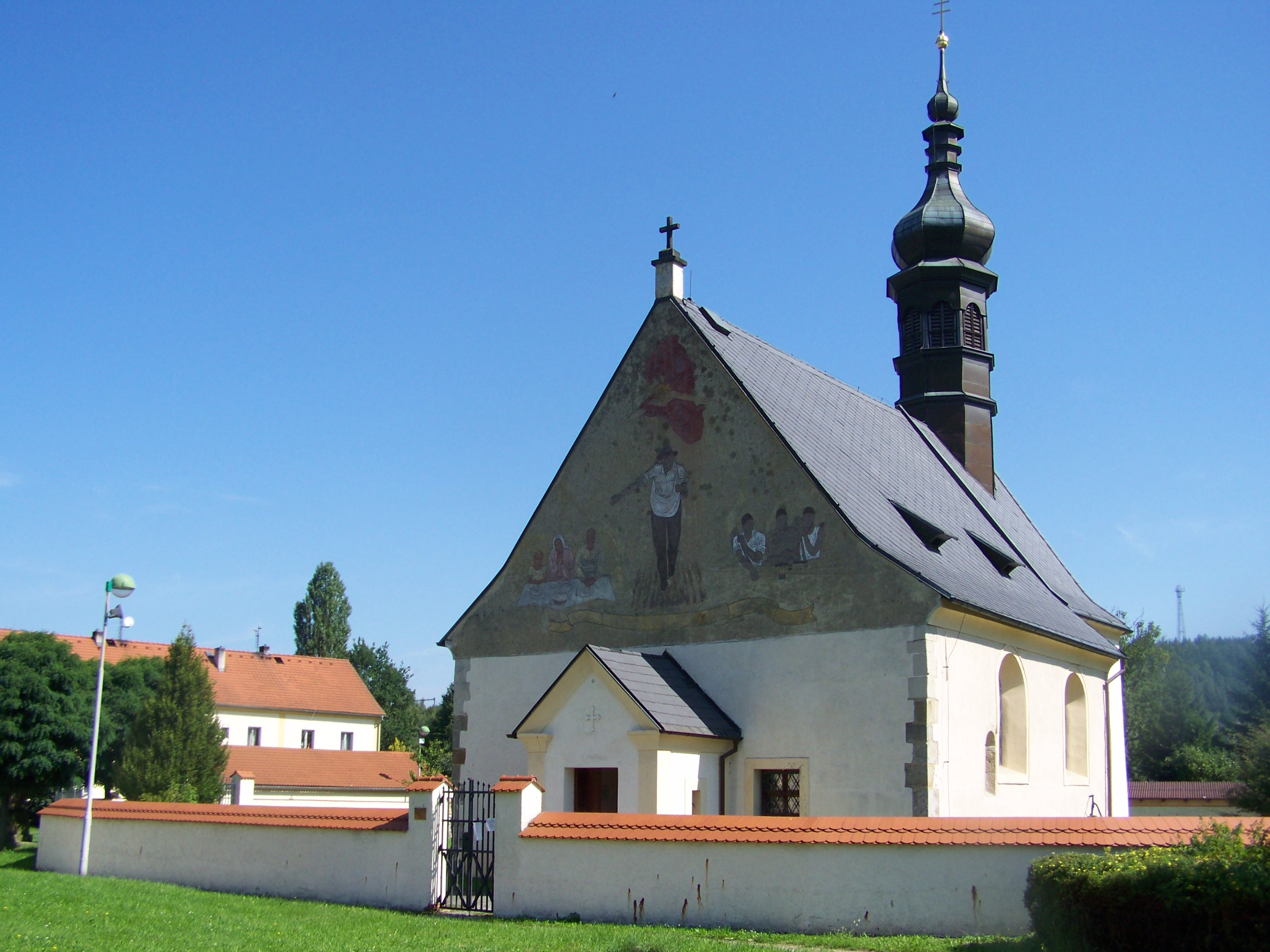 Královské Poříčí, okres Sokolov, Česká republika; kostel sv. Kunhuty